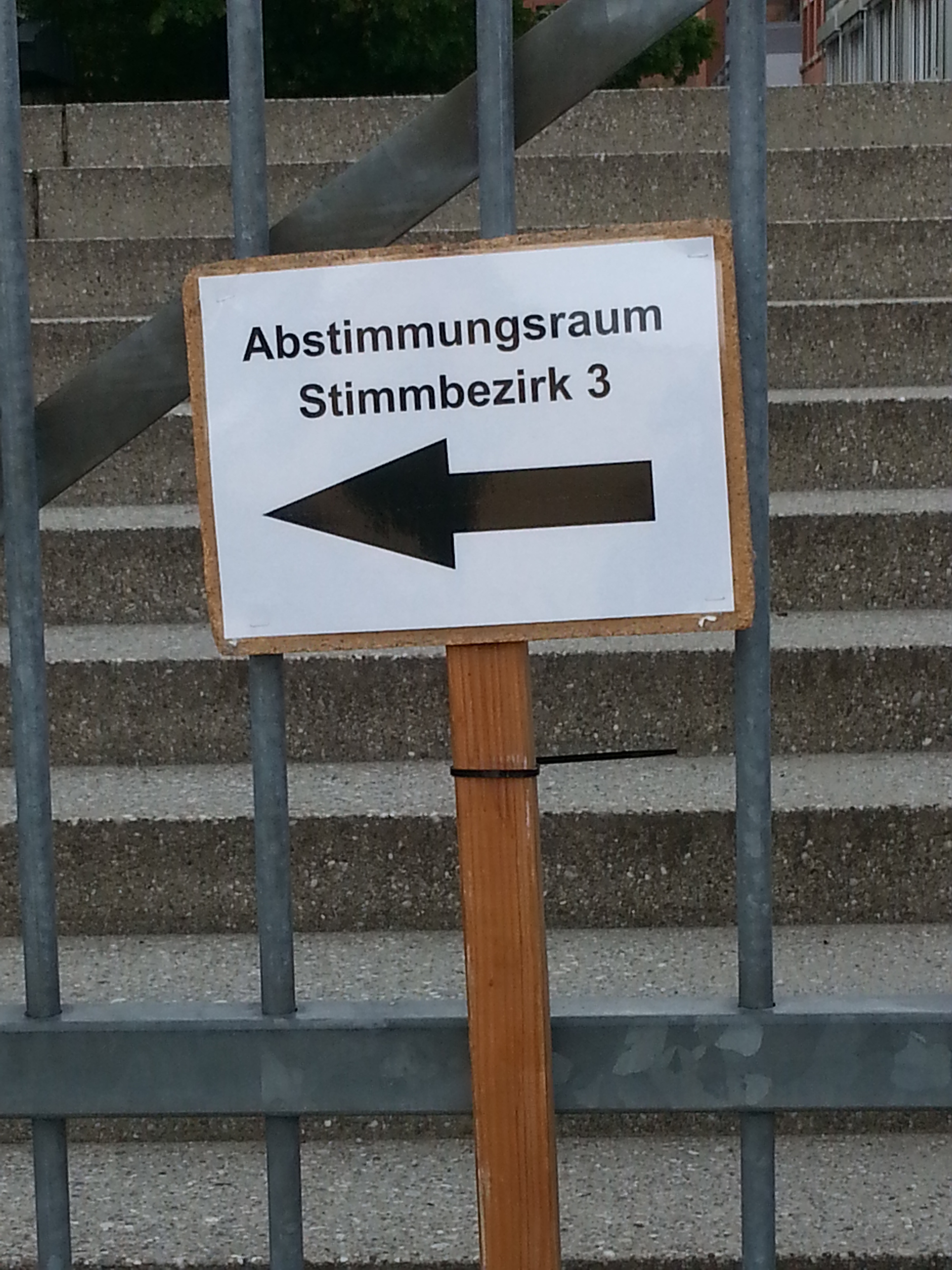 Wahllokal Bundestagswahl 2013